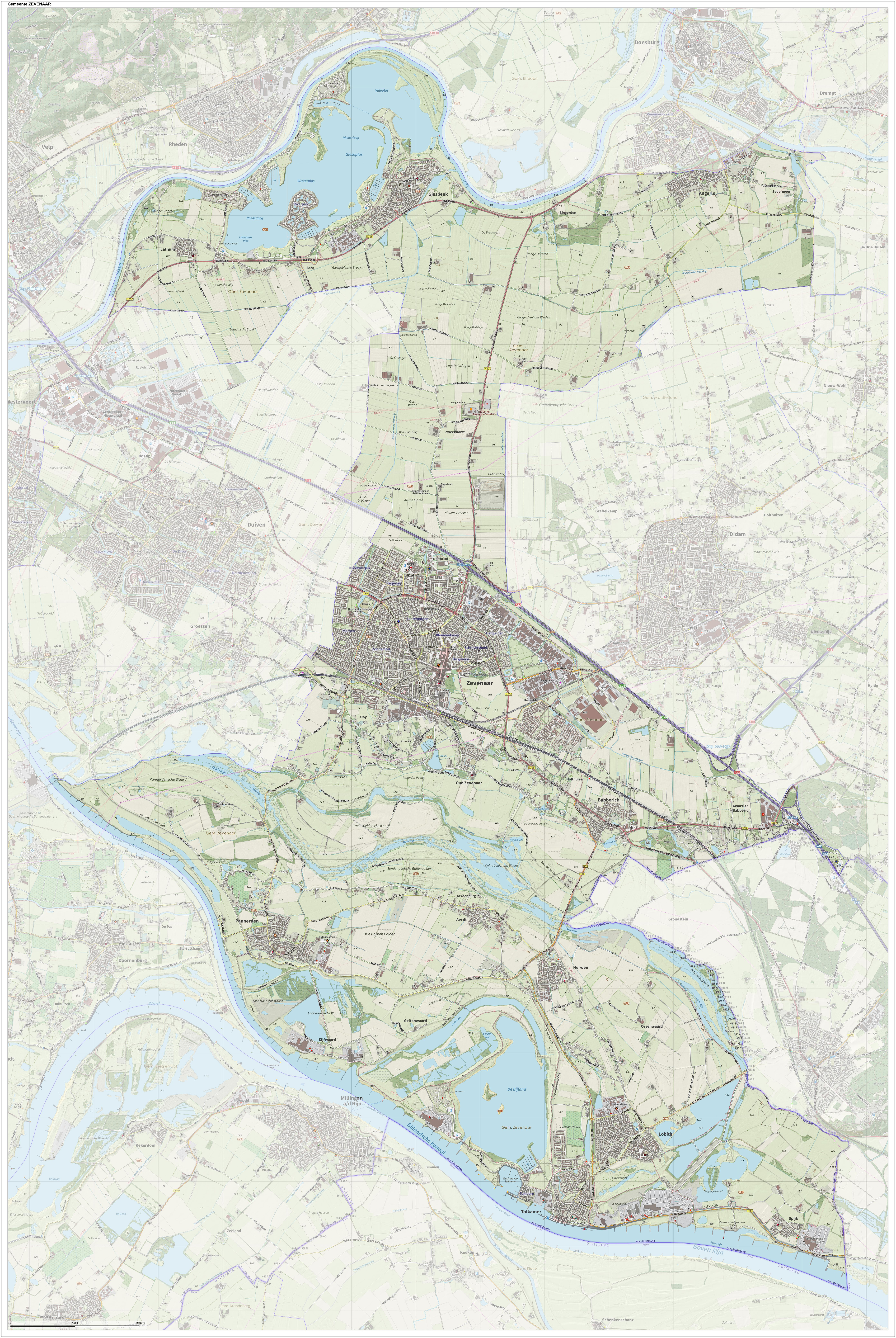 Topografische gemeentekaart. Resolutie: 400 pixels/km. Kaartbeeld samengesteld uit de open geodata van de Top10NL en Top25namen (Kadaster), Creative Commons-BY licentie. Gebouwvlakken uit open geodata BAG extract. Wegen uit de OpenStreetMap, OpenStreetMap community. Reliëfschaduw uit de Actuele Hoogtekaart AHN2. Samenstelling en kleurenschema: Jan-Willem van Aalst, met QGIS. Zie ook de Legenda.